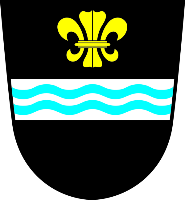 Ecusson Planfayon (Plaffeien)